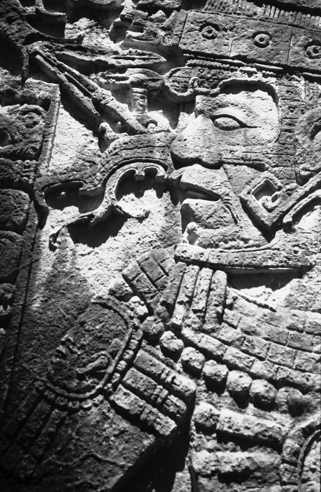 Late Classic Stella (Detail) Seibal (also Ceibal) Guatemala (Peten)